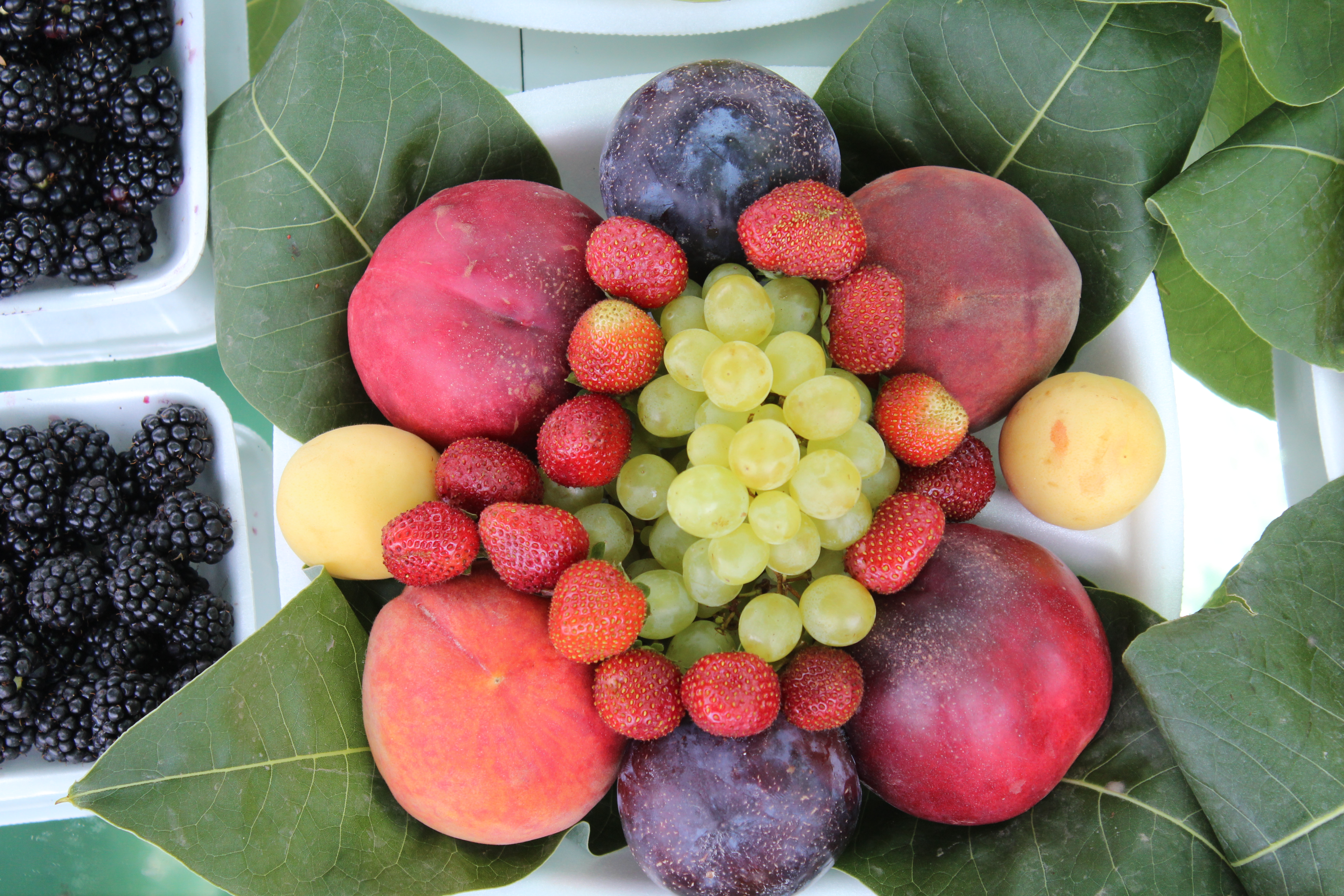 Fruits in Turkey